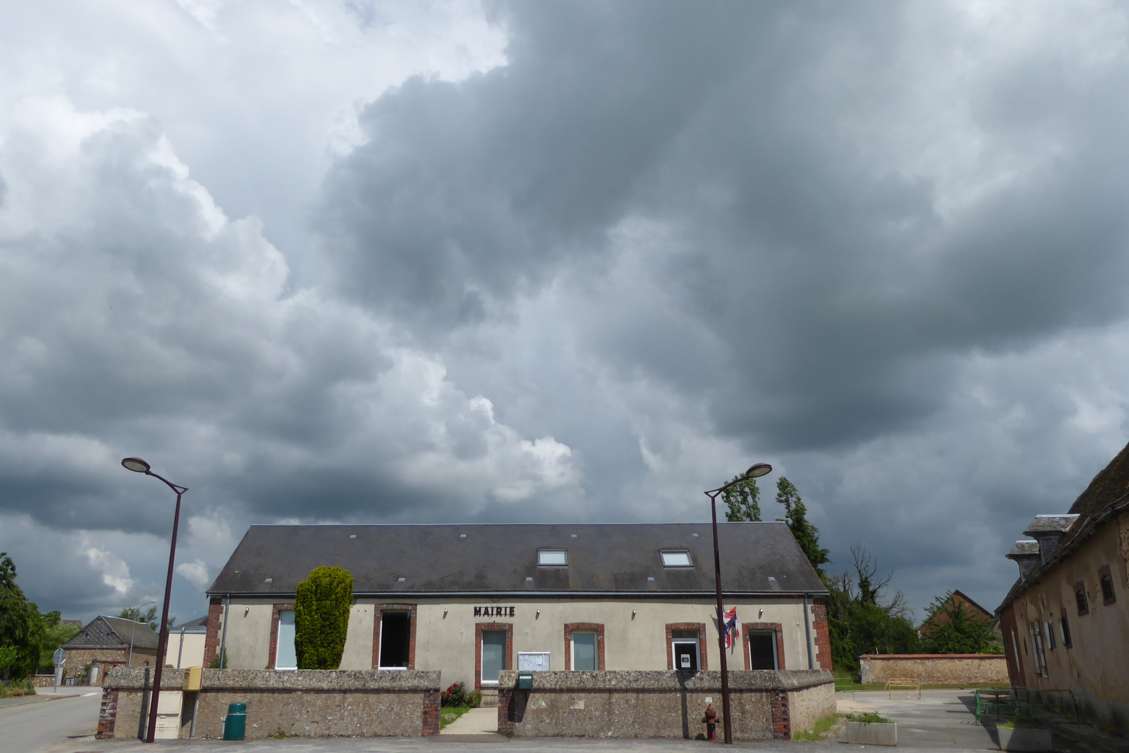 mairie de Vitray-en-Beauce, Eure-et-Loir, France.